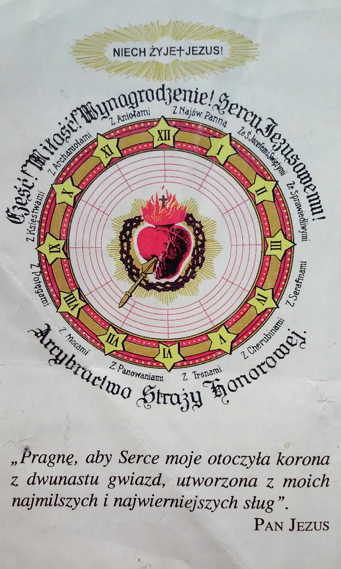 Zegar Straży Honorowej Najświętszego Serca Pana Jezusa. Obrazek z modlitwą Ofiarowania Godziny Straży na odwrocie.